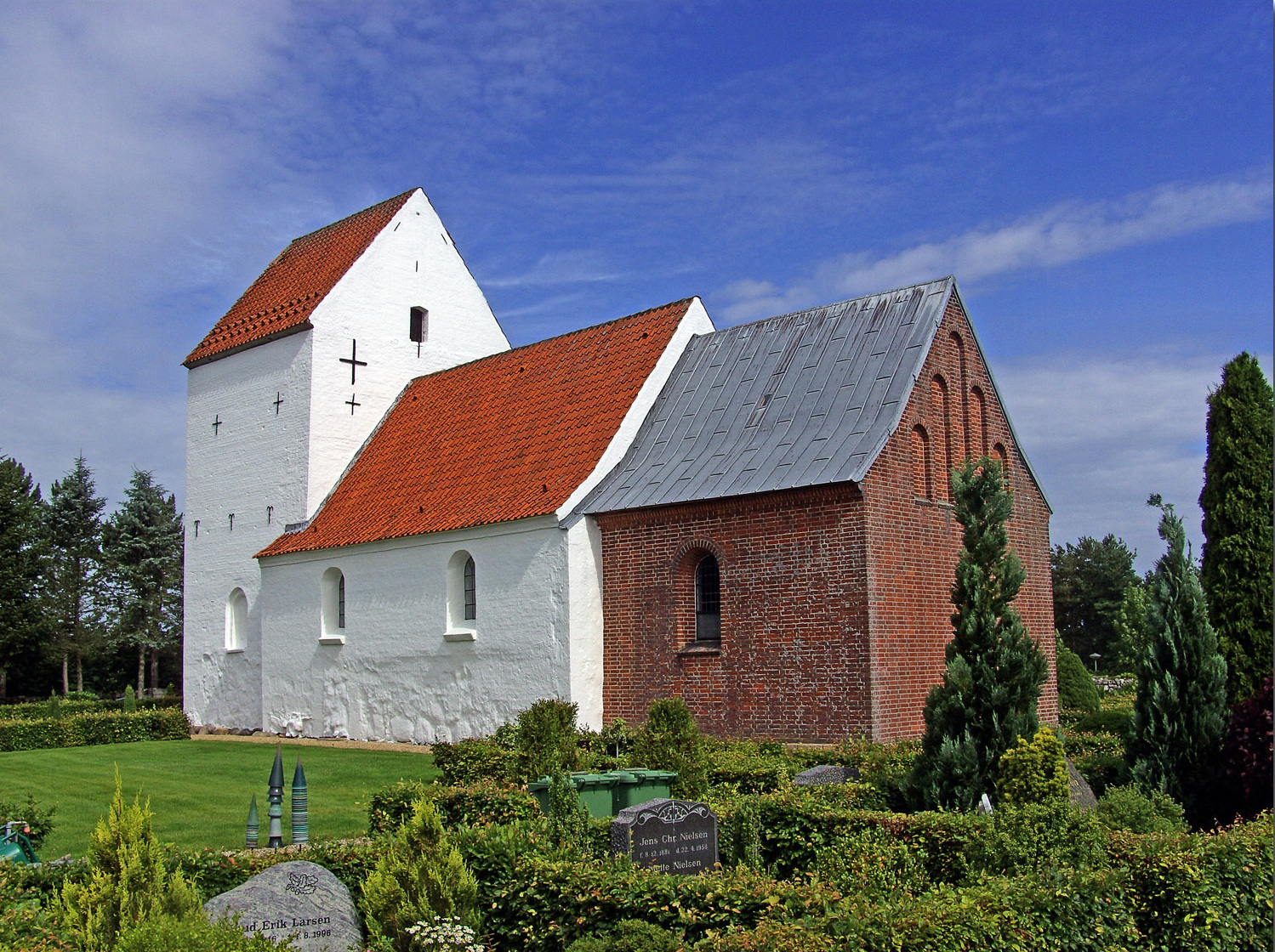 fra sydøst